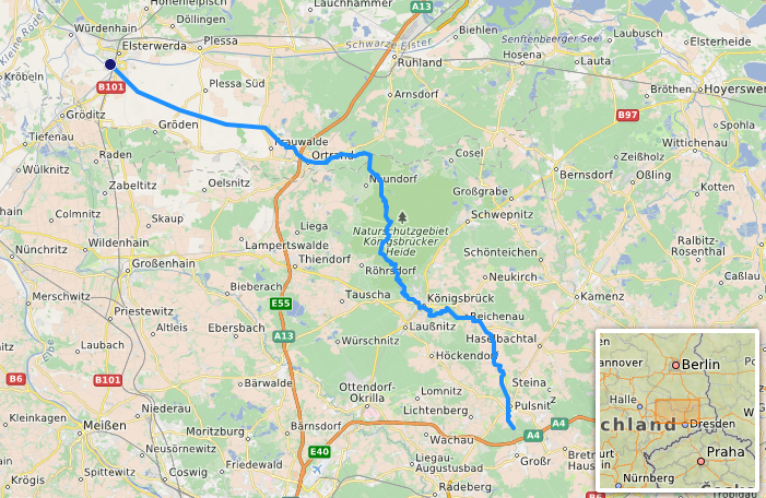 carte réalisée sur umap [1] This map may be incomplete, and may contain errors. Don't rely solely on it for navigation.